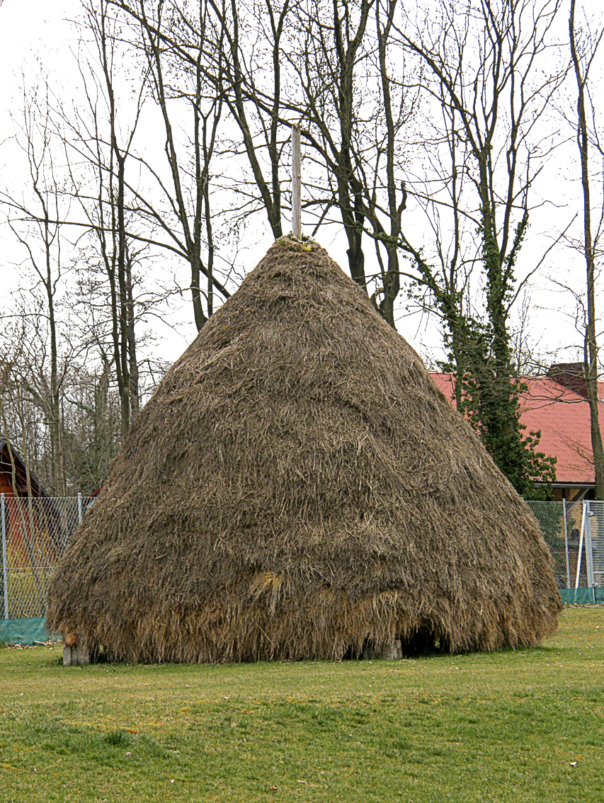 Ein Heudiemen in Spreewald